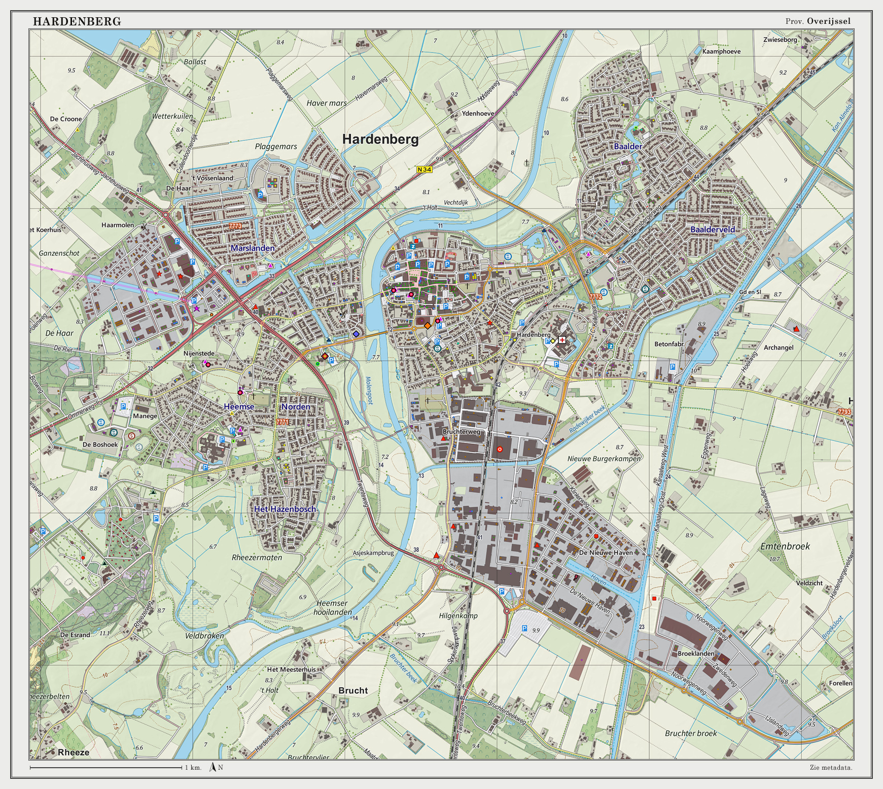 Topografische kaart van Hardenberg (woonplaats). Resolutie: 300 pixels/km. Kaartbeeld samengesteld uit de open geodata van de Top10NL en Top25namen (Basisregistratie Topografie, Kadaster, 28-apr-2014), Creative Commons BY licentie. Gebouwvlakken uit open geodata BAG extract (8-jun-2014). Wegen uit de OpenStreetMap (8-jun-2014). Schaduwreliëf uit de Actuele Hoogtekaart AHN2 (8-mrt-2014). Samenstelling en kleurenschema: Jan-Willem van Aalst, met QGIS2. Zie ook de Legenda.